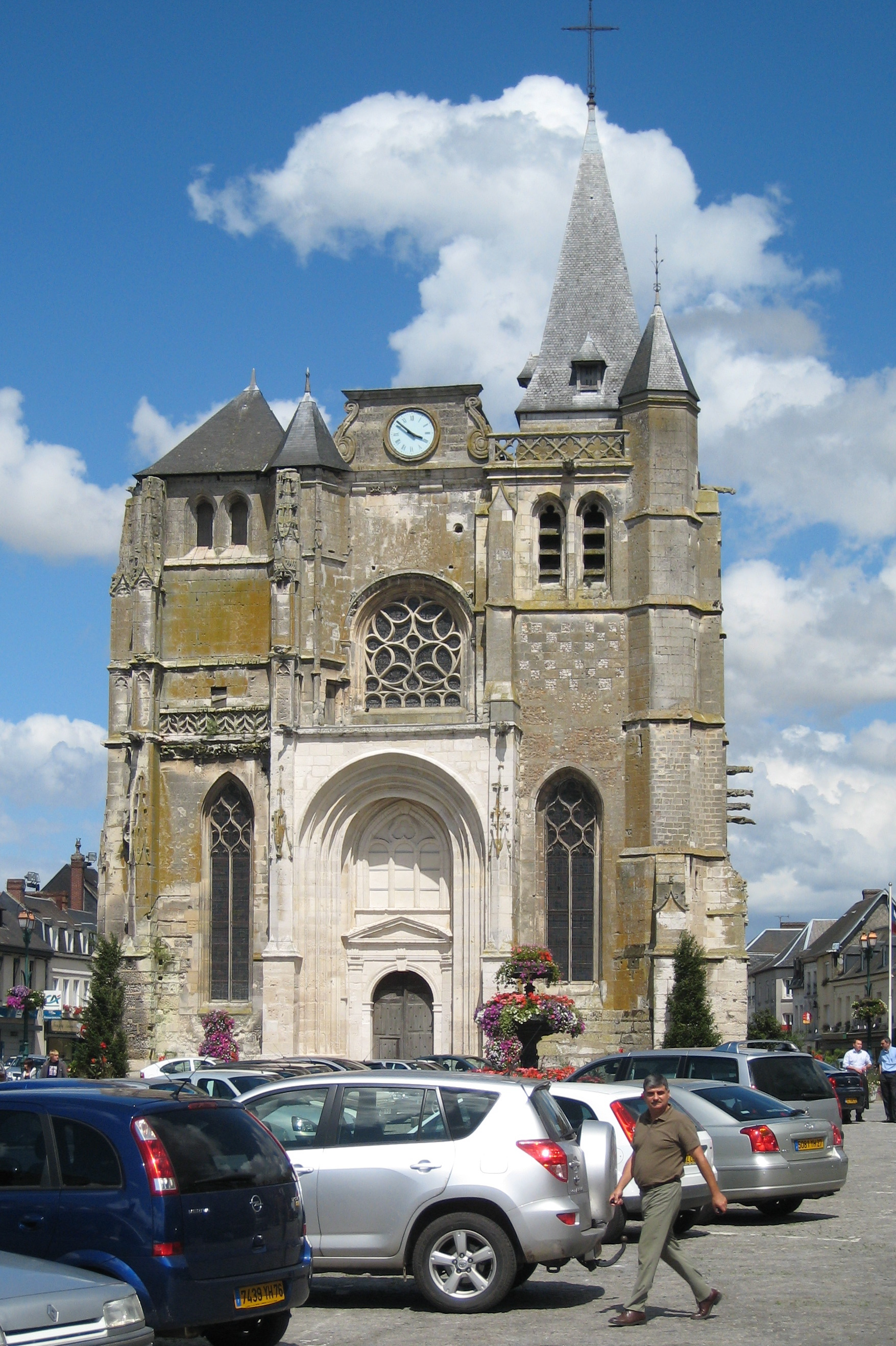 Église Saint-Pierre-et-Saint-Paul du Neubourg (Eure)